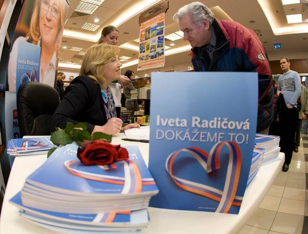 Iveta Radičová, autogramiáda v Prešove